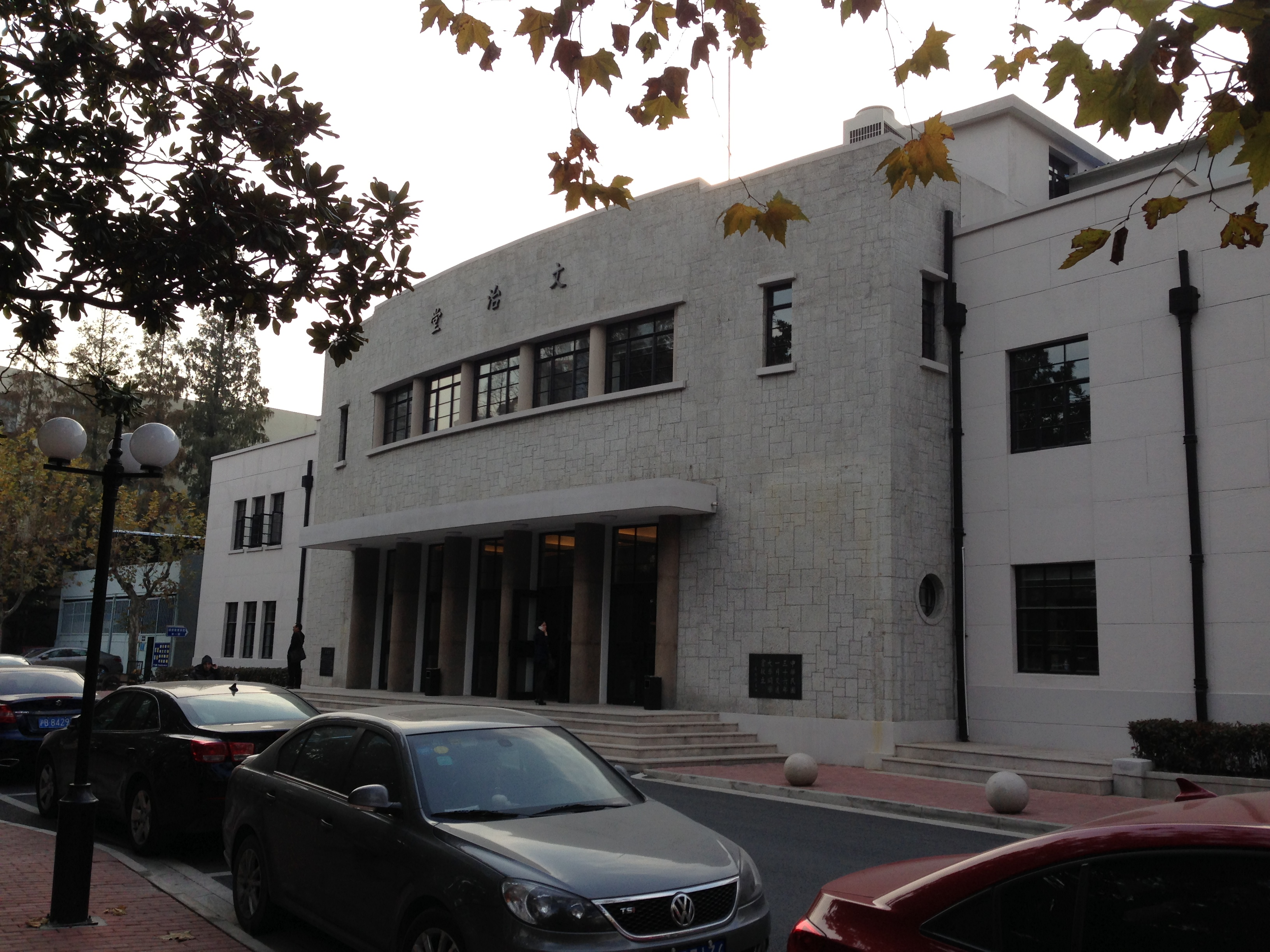 上海交通大学徐汇校区文治堂